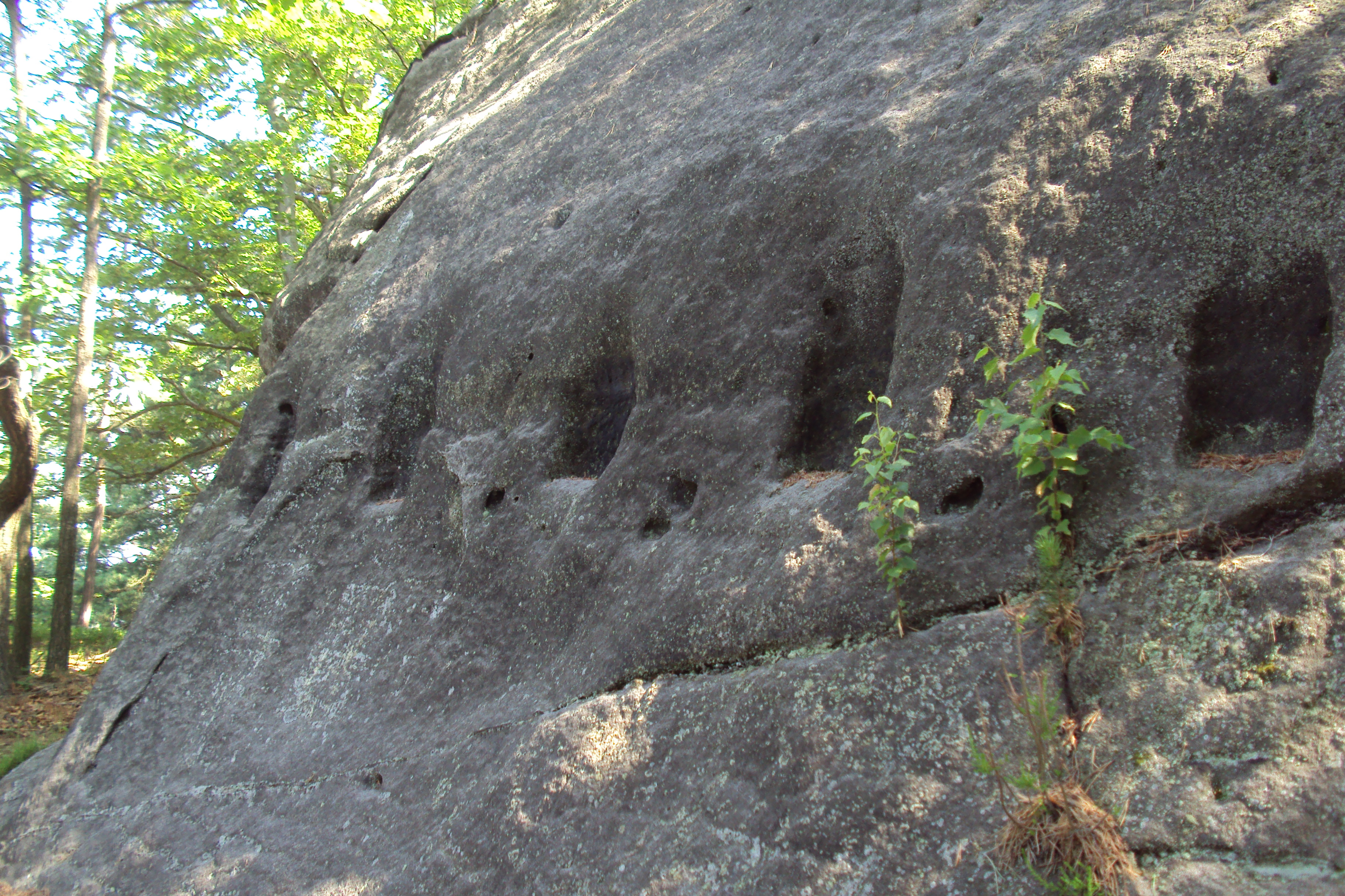 Na skále vedle vodárny pod osadou Hvězda stával hrádek